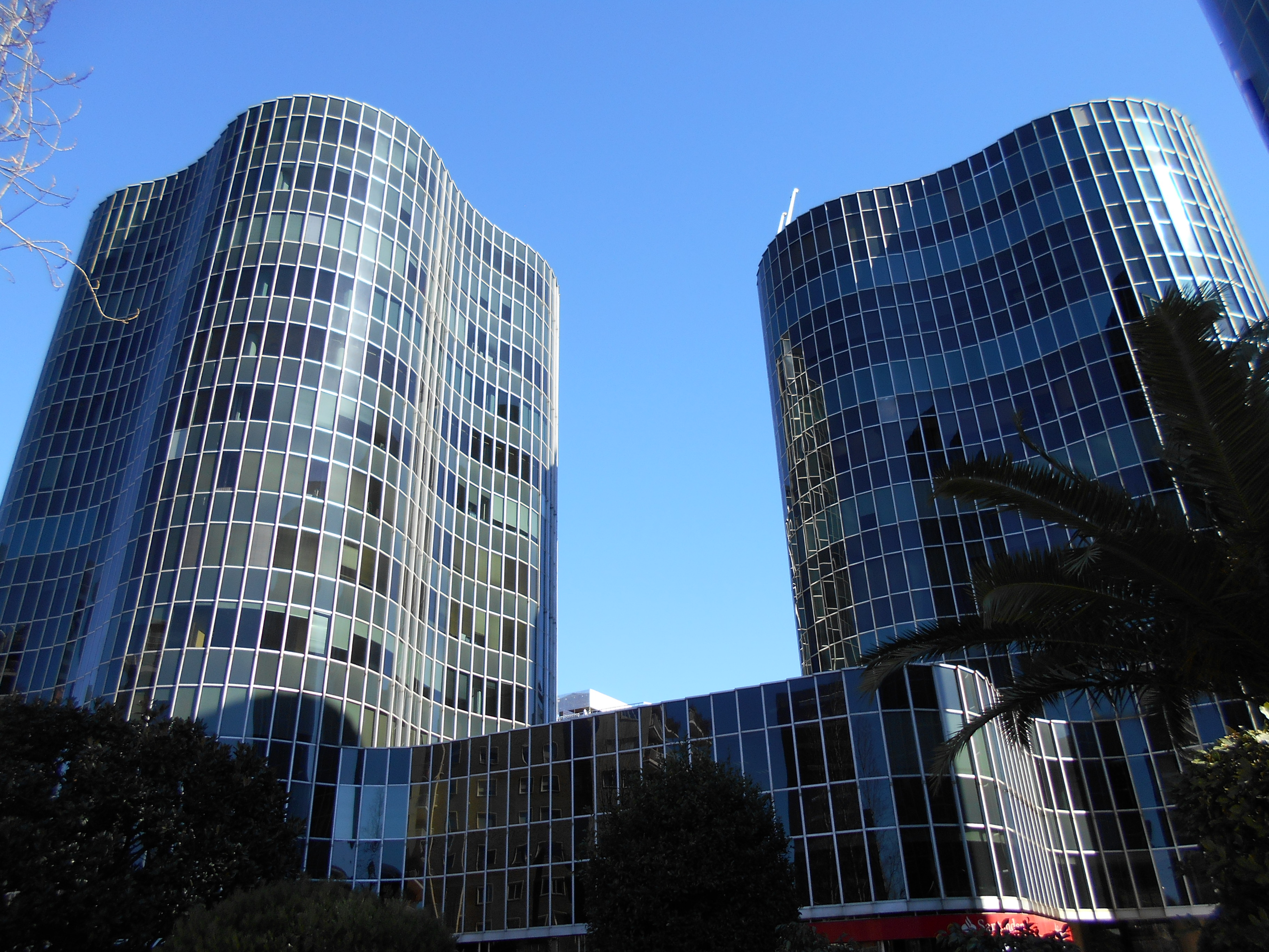 Edificios Trade (Barcelona).